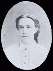 Marie Anderson, Nederlands activiste en schrijfster